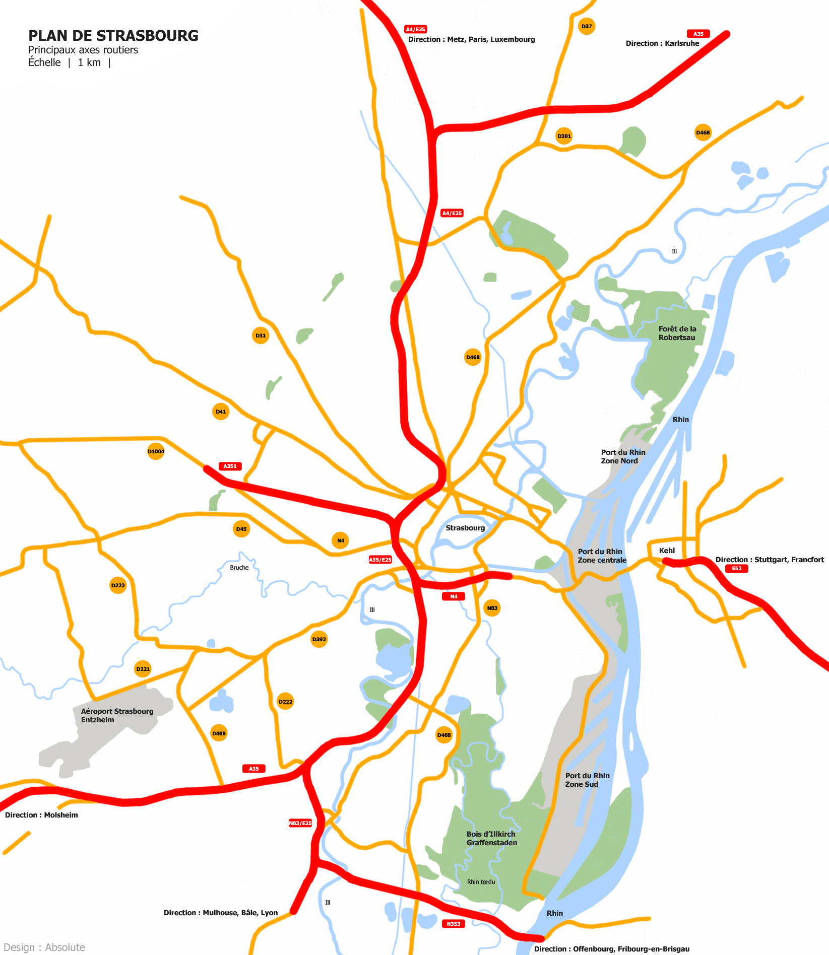 Plan de Strasbourg - Axes routiers